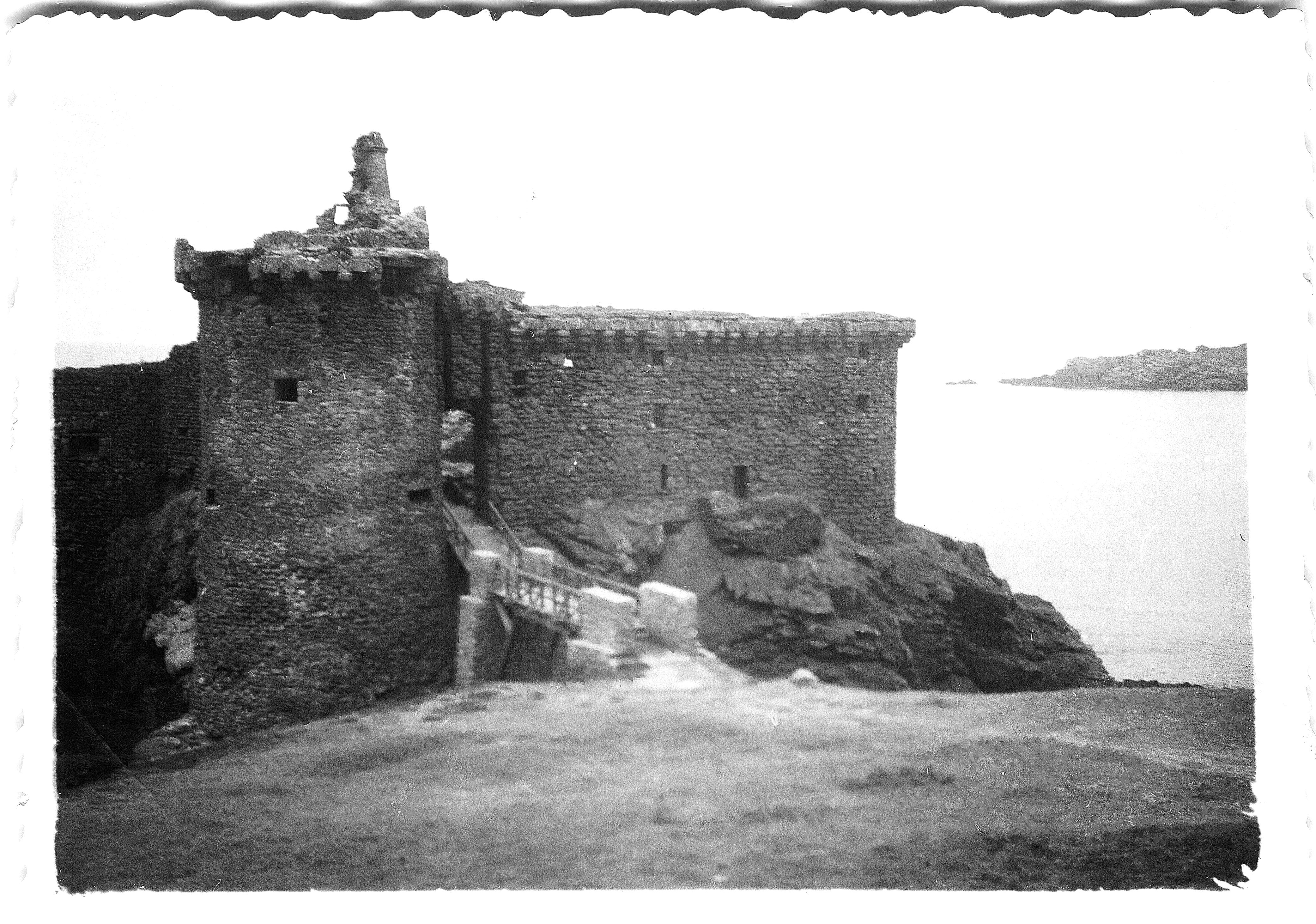 La façade principale du Vieux Château. Ce château-fort a été construit sur la Côte Sauvage et sur un rocher indépendant de la falaise. Il est daté du XIVème siècle mais il a probablement été hérigé antérieurement. Il est à l' état de ruine entretenue. En 1900, le Vieux Château a été classé Momument Historique (MH). Il est situé proche du Port de La Meule. La Côte Sauvage de L' Île d' Yeu est située au sud-ouest de l' île entre le Pointe du But et la Pointe des Corbeaux. C'est une côte rocheuse. L' Île-d' Yeu, Vendée, France.